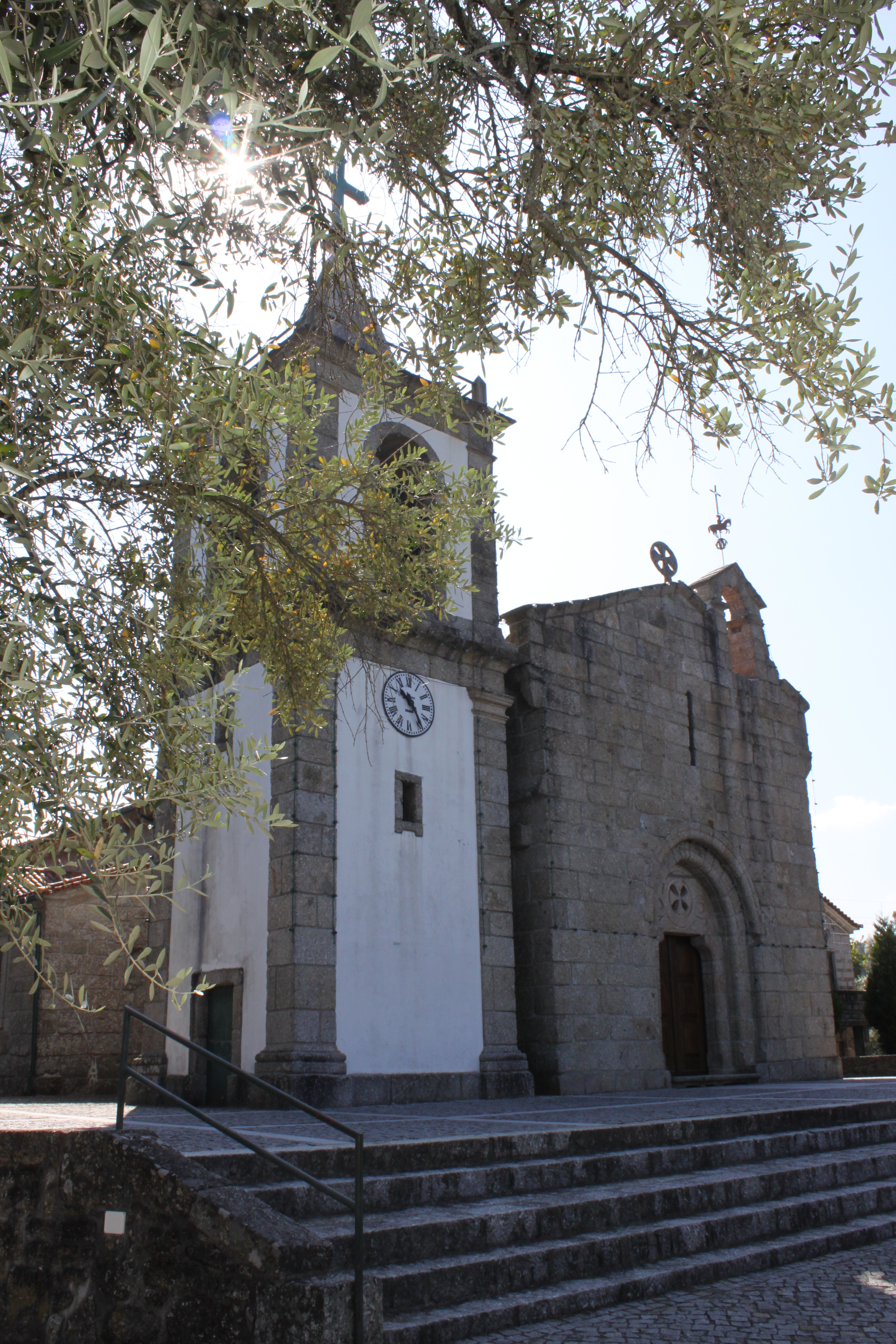 Eglise de Verim